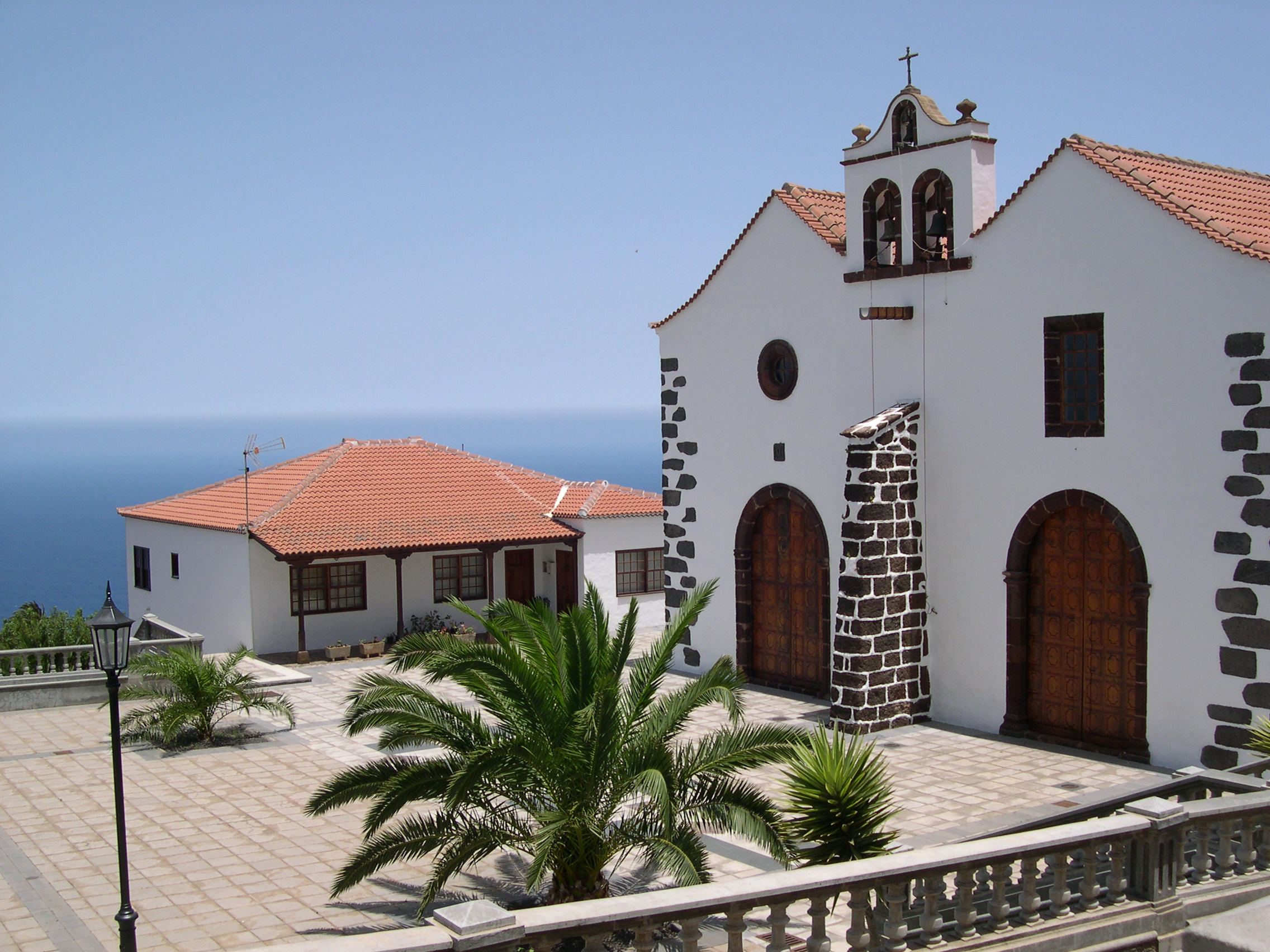 Typical church, Iglesia Nuestra Señora de la Luz, Santo Domingo de . La Palma (Canary Islands, Spain)